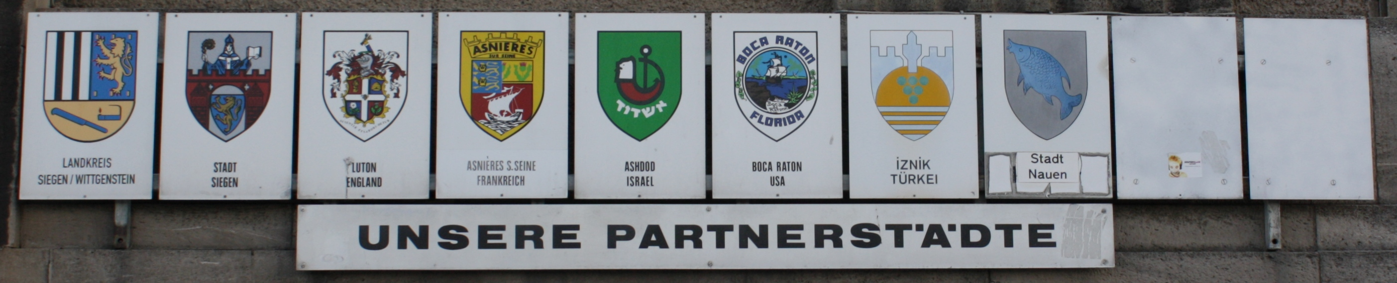 Eine Tafel am Rathaus Spandau in Berlin mit den Partnerstädten Spandaus.